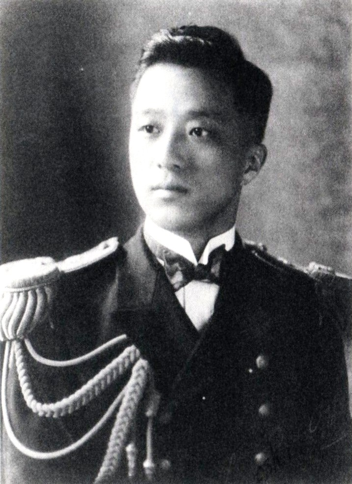 Miwa Yoshitake is an Imperial Japanese Navy Rear Admiral